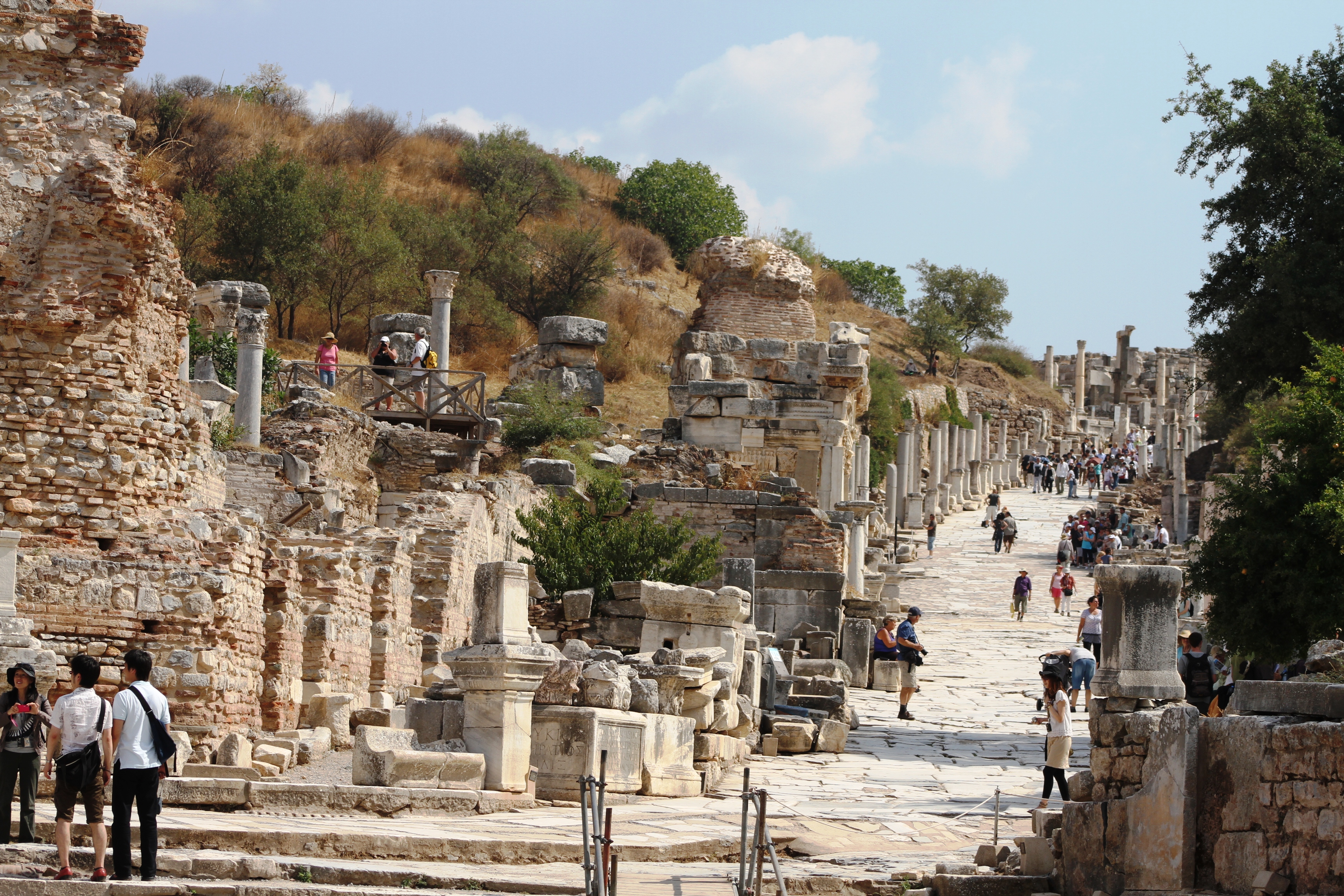 Vista de baixo para cima da rua Curetes em Éfeso